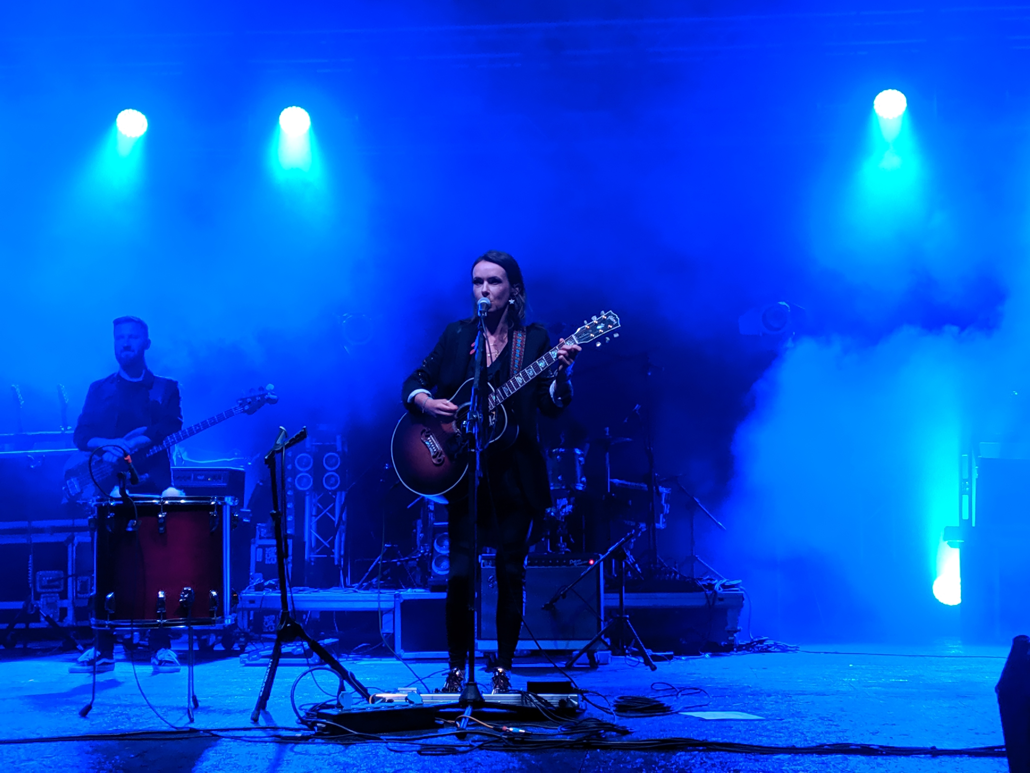 Kasia Kowalska podczas koncertu w 2019 r.